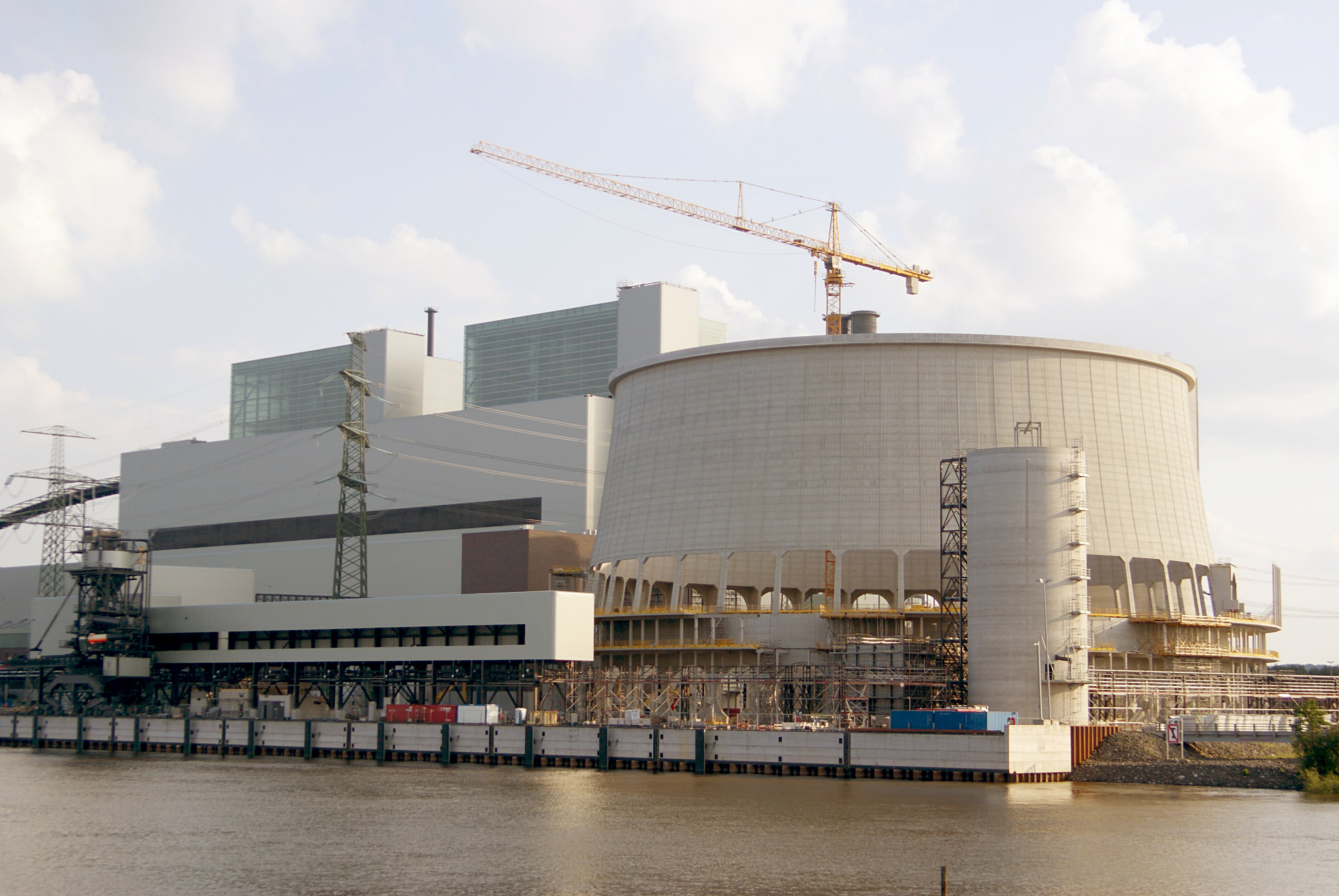 Dies ist die Baustelle des Kraftwerks Moorburg im August 2012